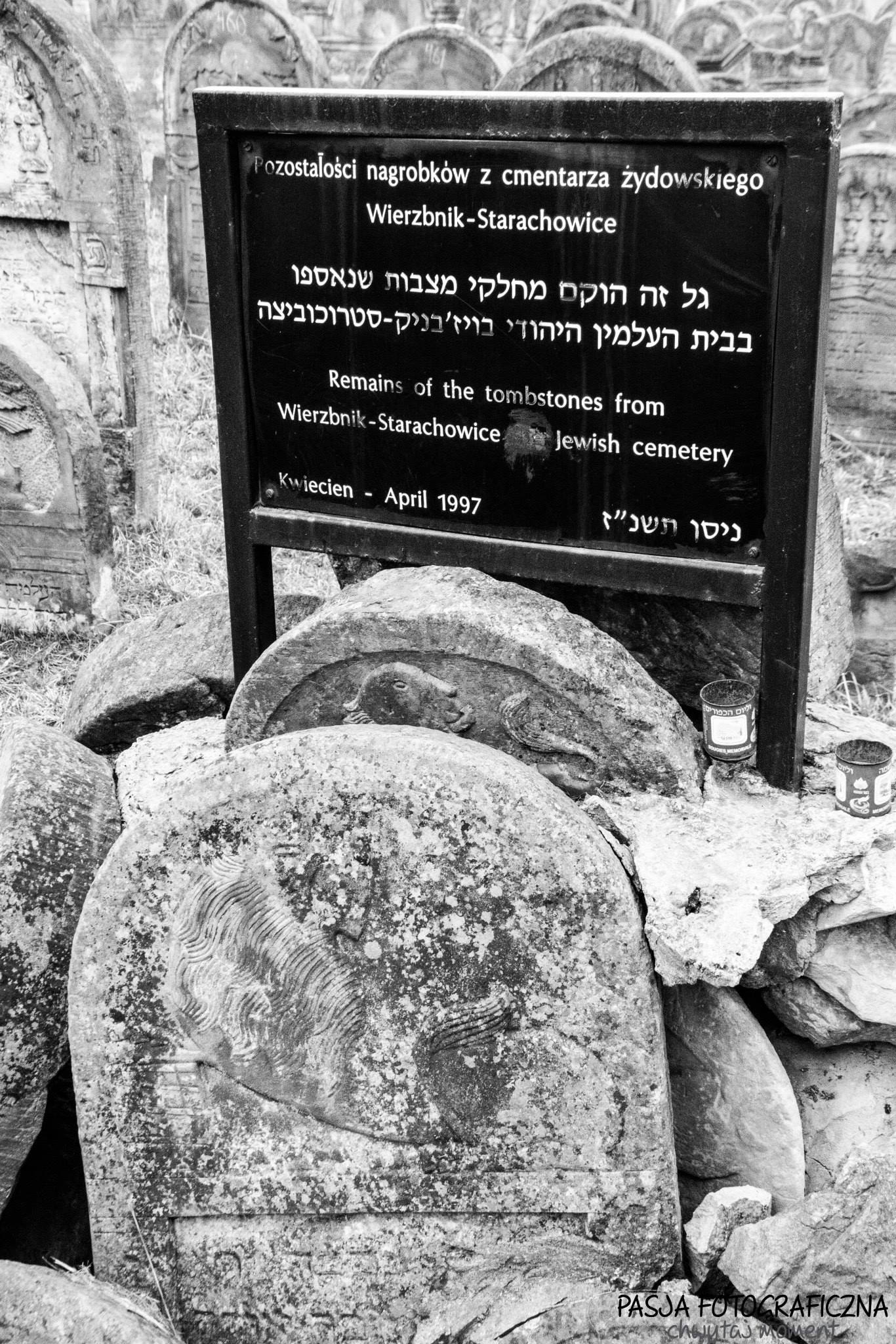 Starachowice, cmentarz żydowski, kon. XIX w.